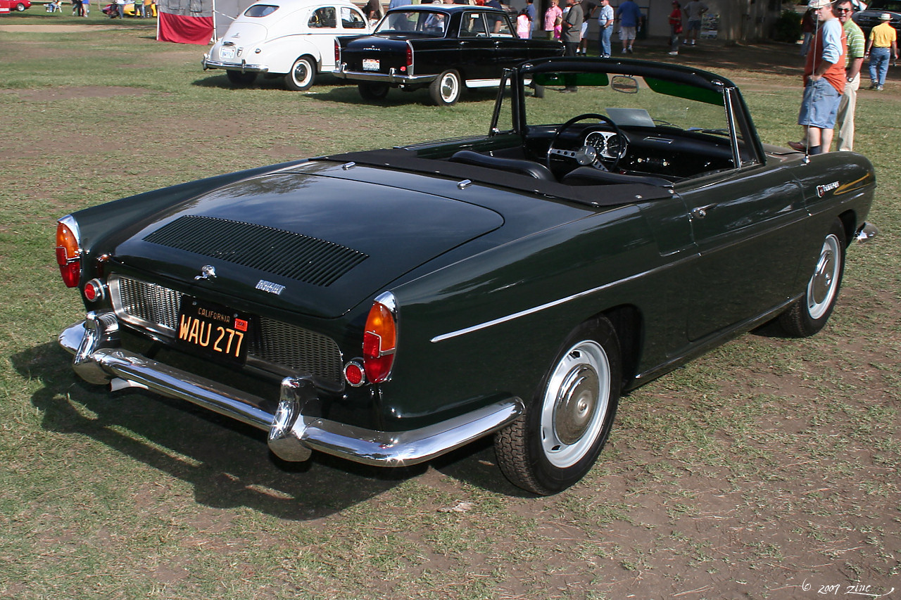 1967 Renault Caravelle cnv - rvr-1